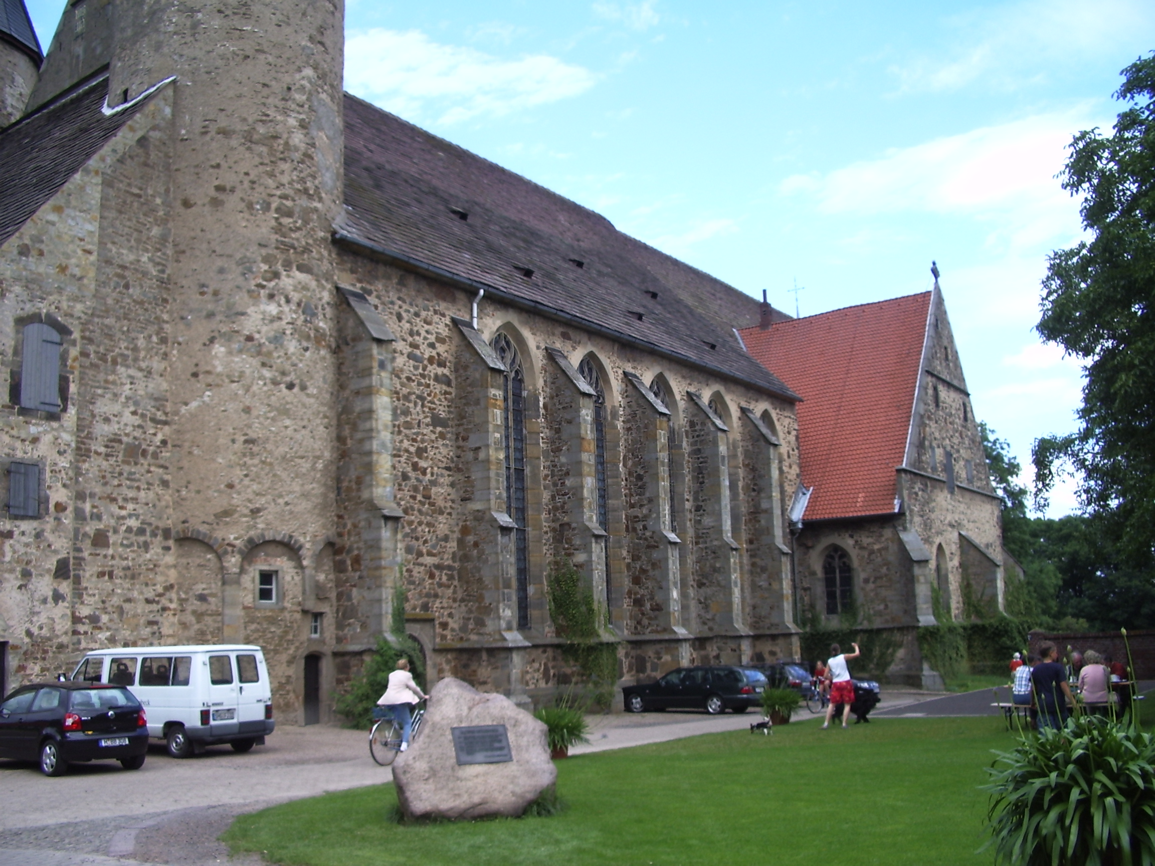 Kloster Möllenbeck